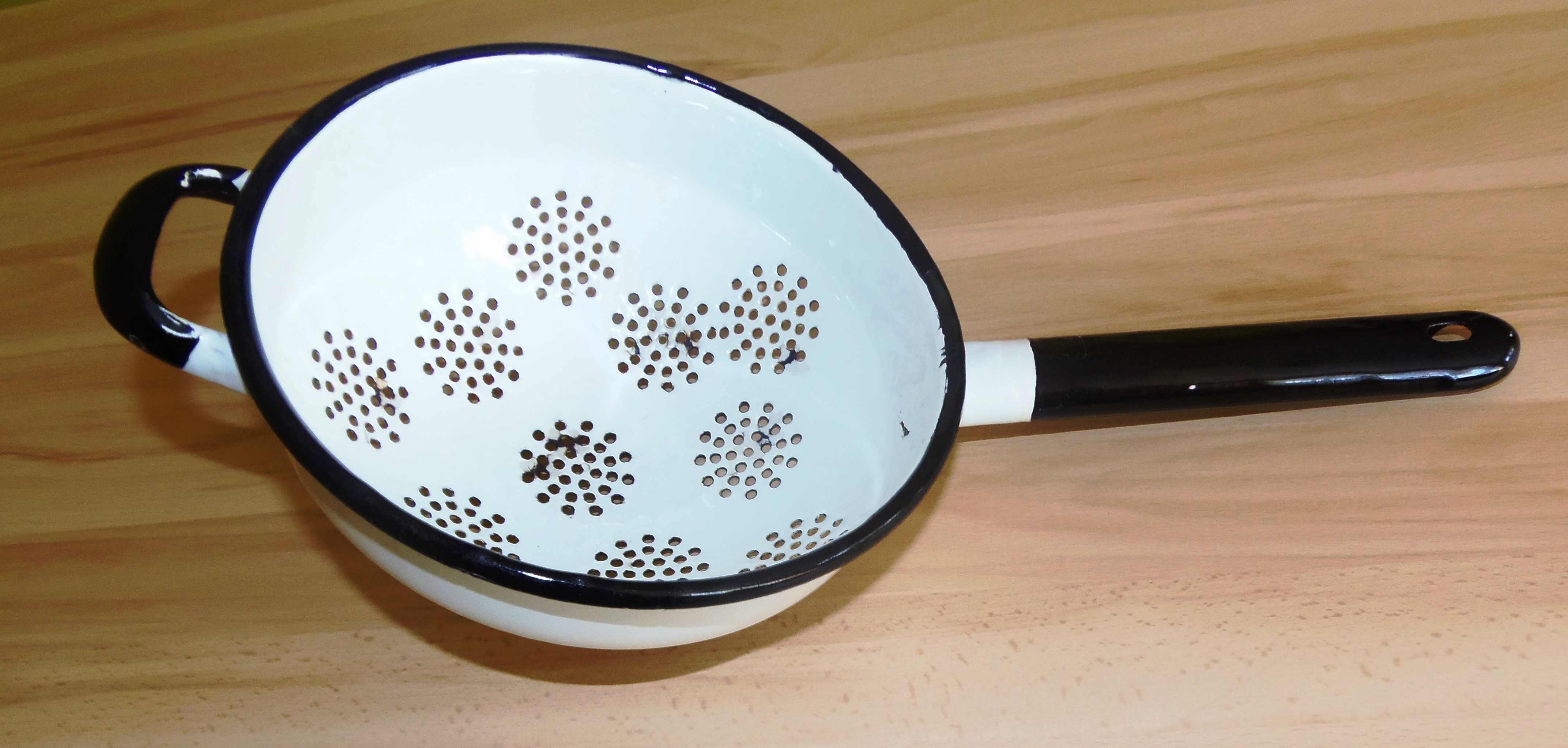 dowolne zdjęcie łyżki durszlakowej English | Polski | +/−